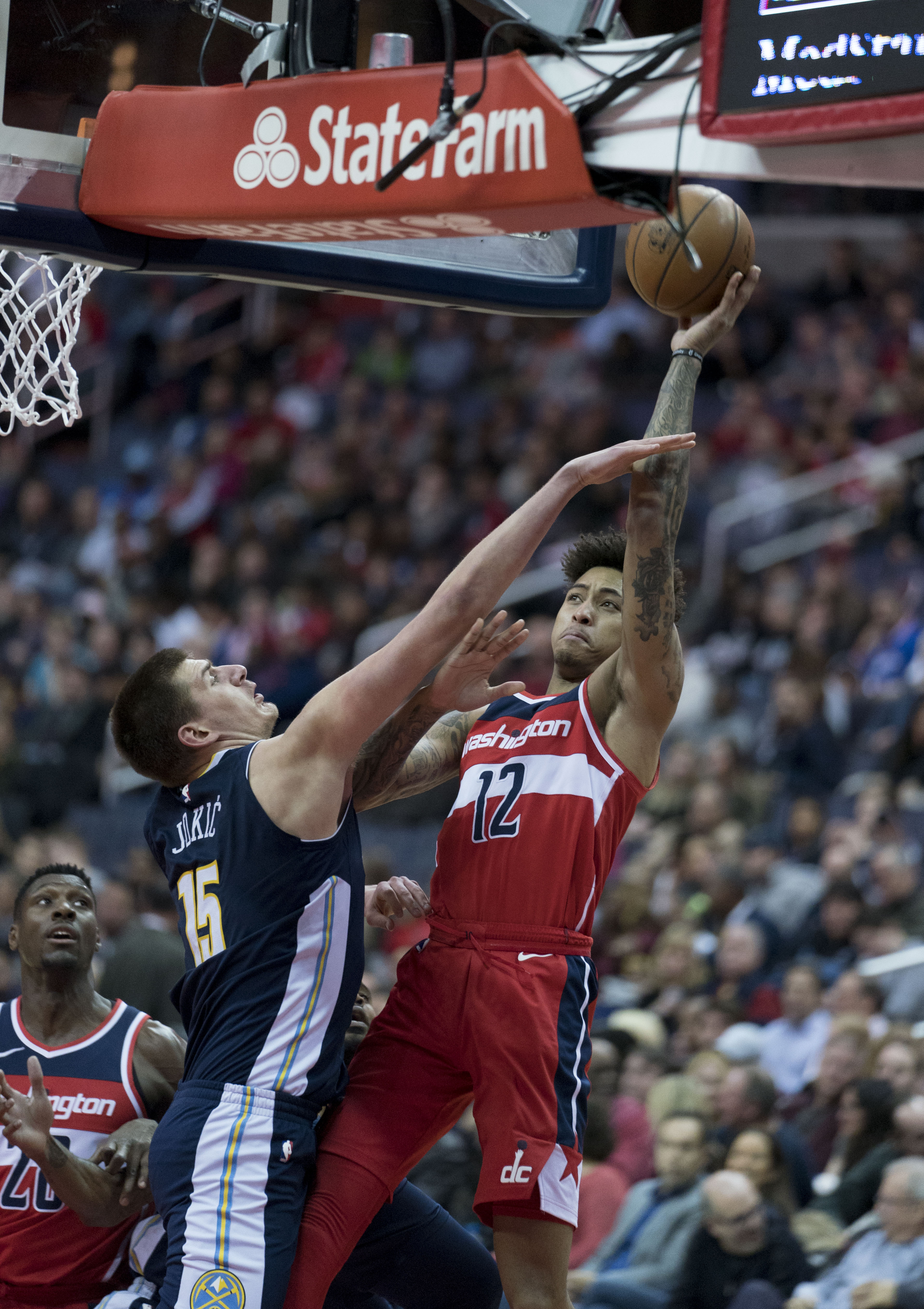 Nuggets at Wizards 3/23/18